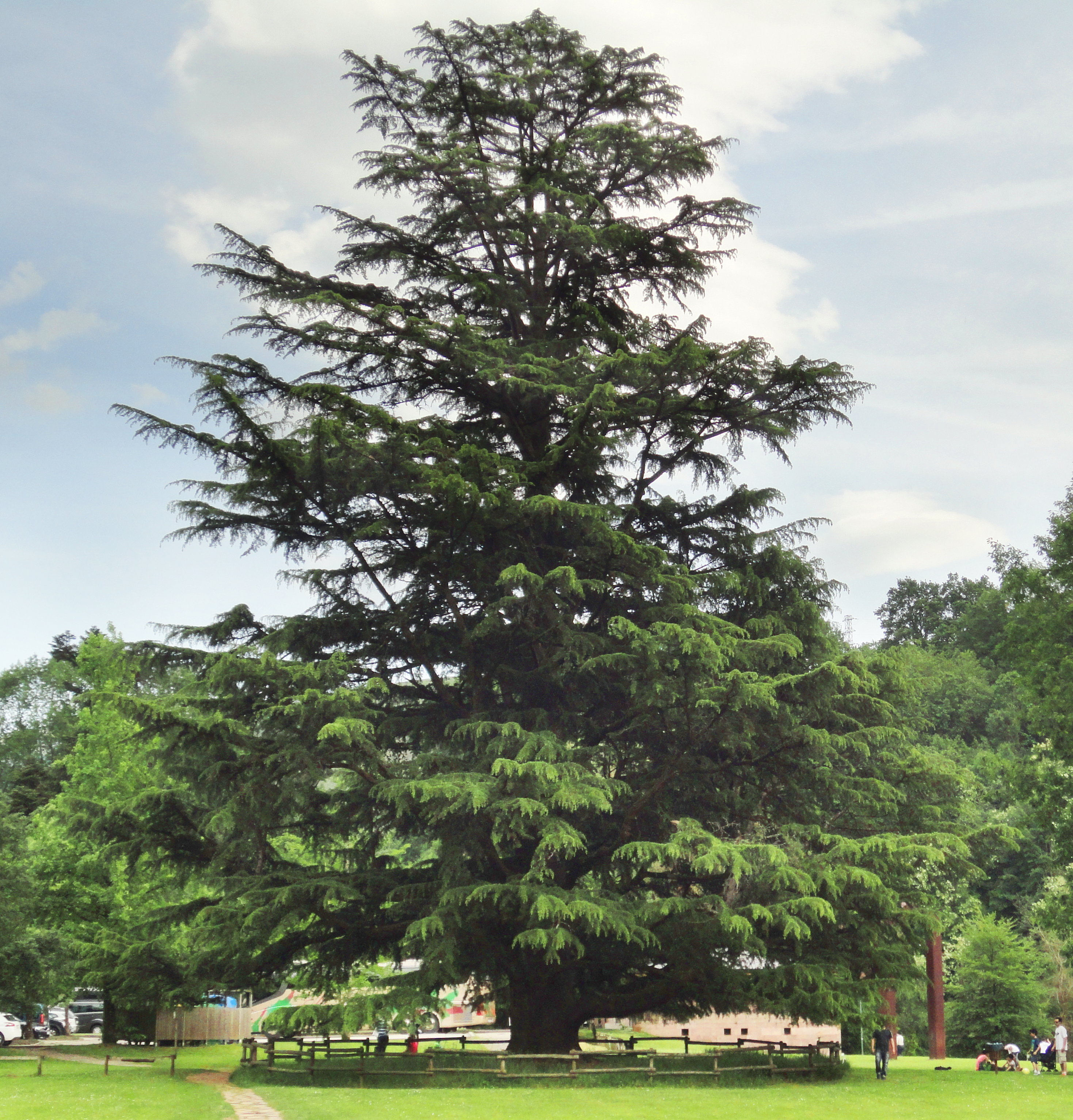 Cedro de Bértiz. Catalogado como monumento natural por el Gobierno de Navarra